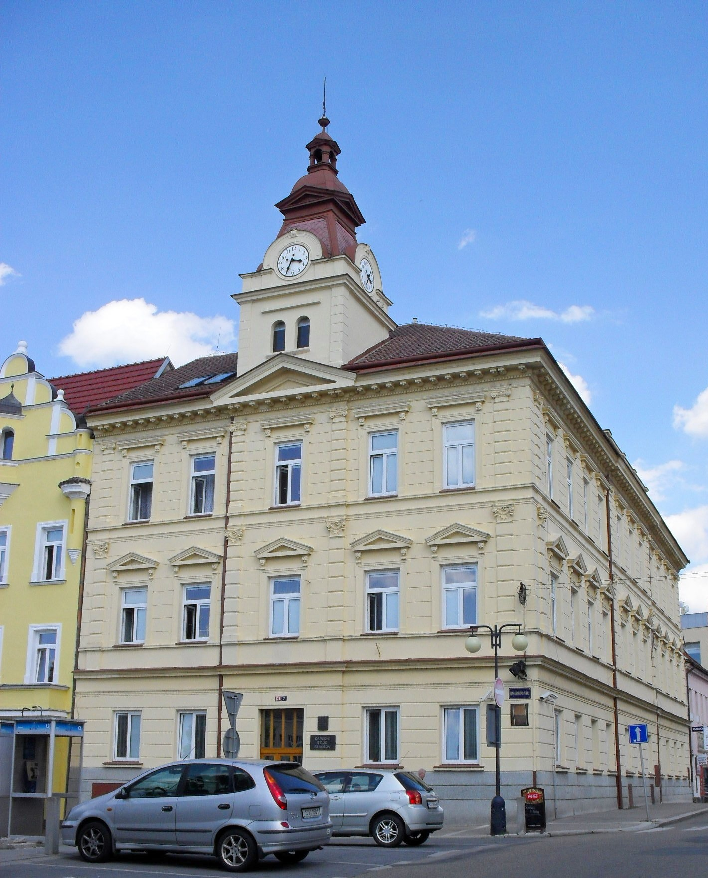 Budova okresního soudu v Benešově